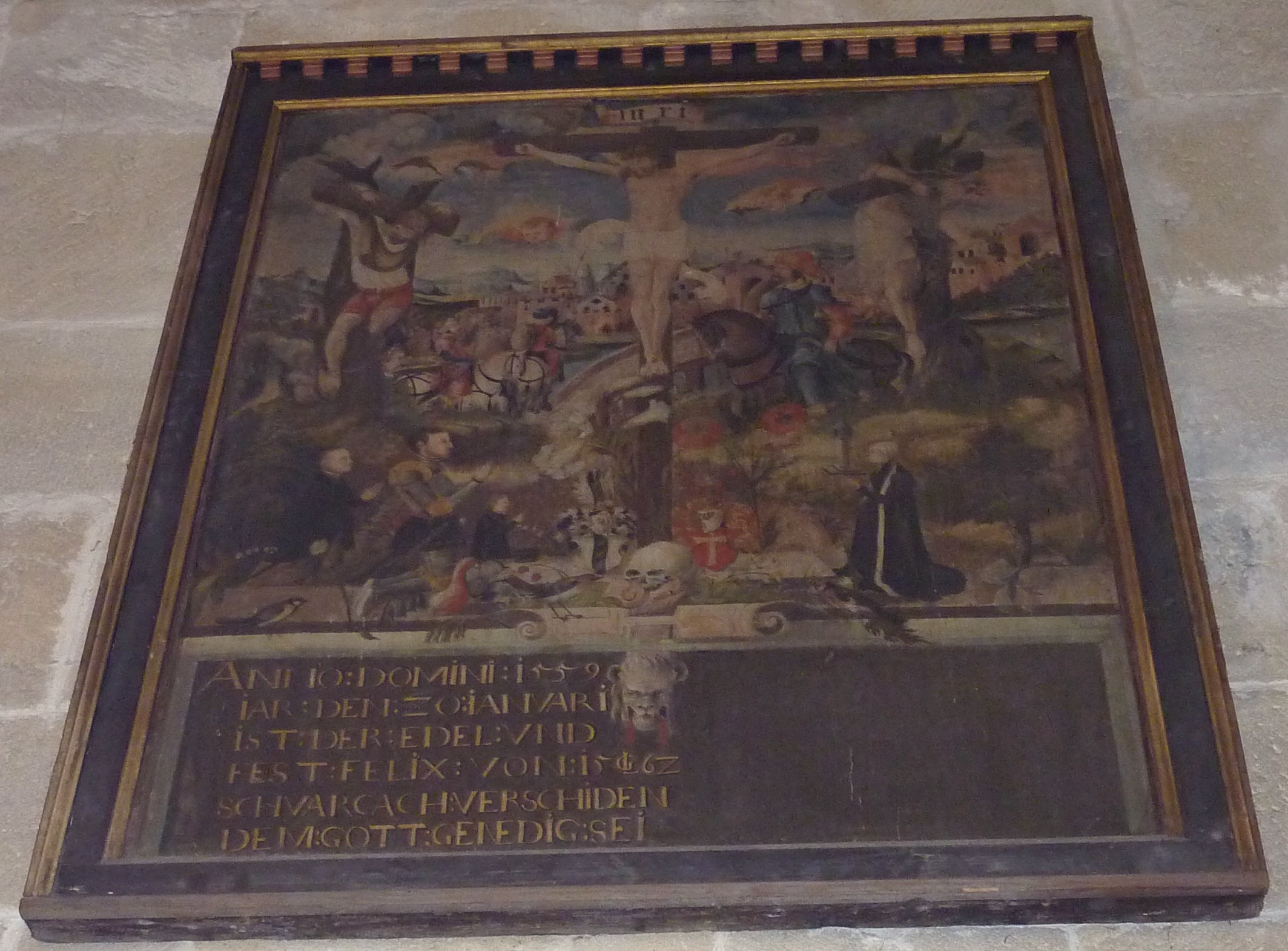 Totentafel in der Stadtkirche St. Dionys in ES